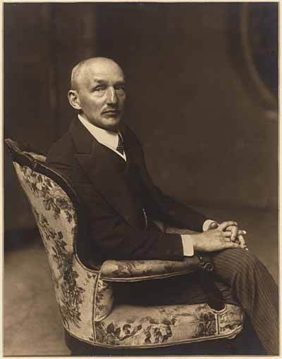 Portrait photographique d'Heinrich Knirr (1862-1944)